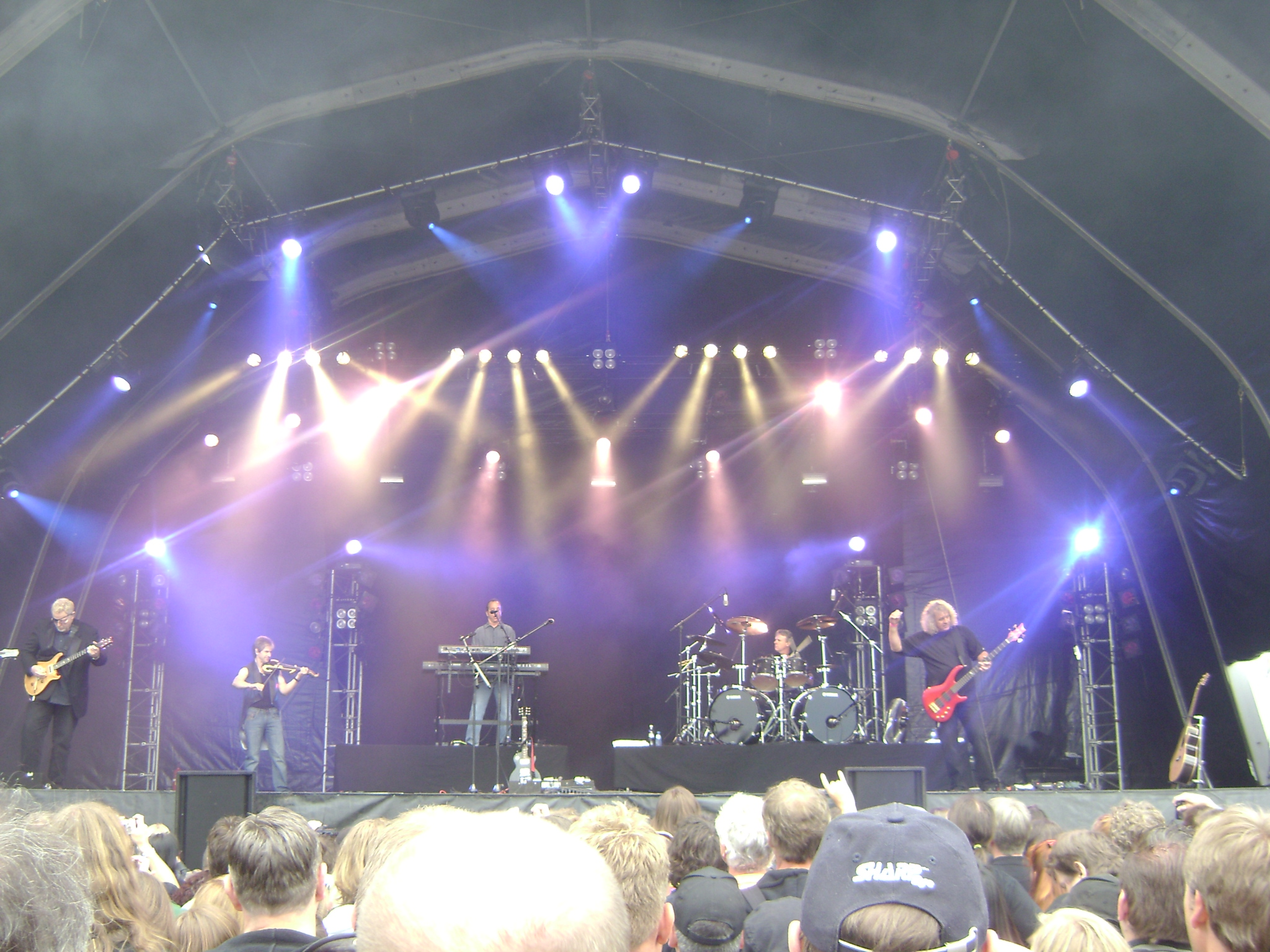 Kansas op het Arrow Rock Festival 2008 in Nijmegen.